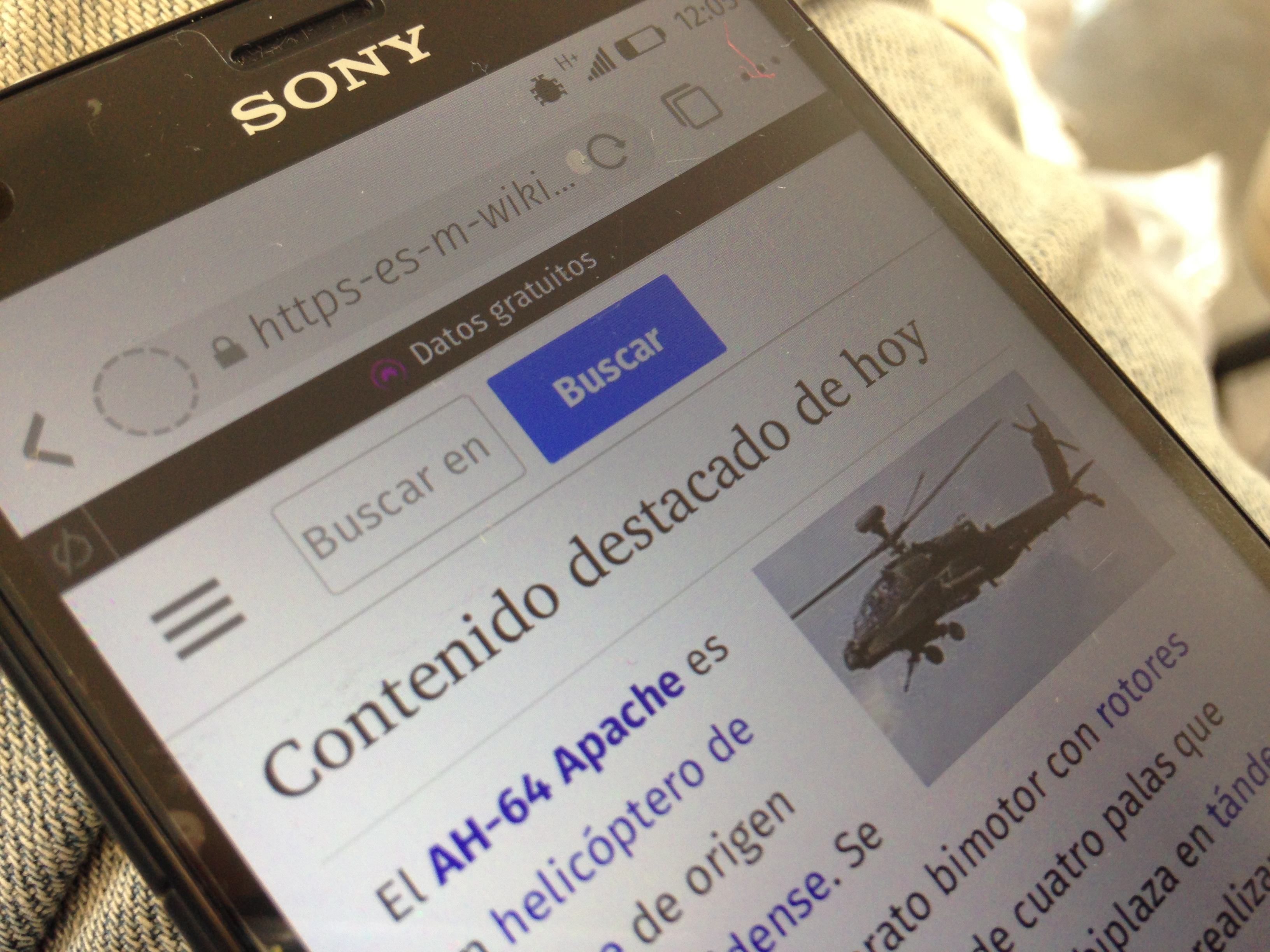 Imagen de un teléfono mostrando Wikipedia por Free Basics en México